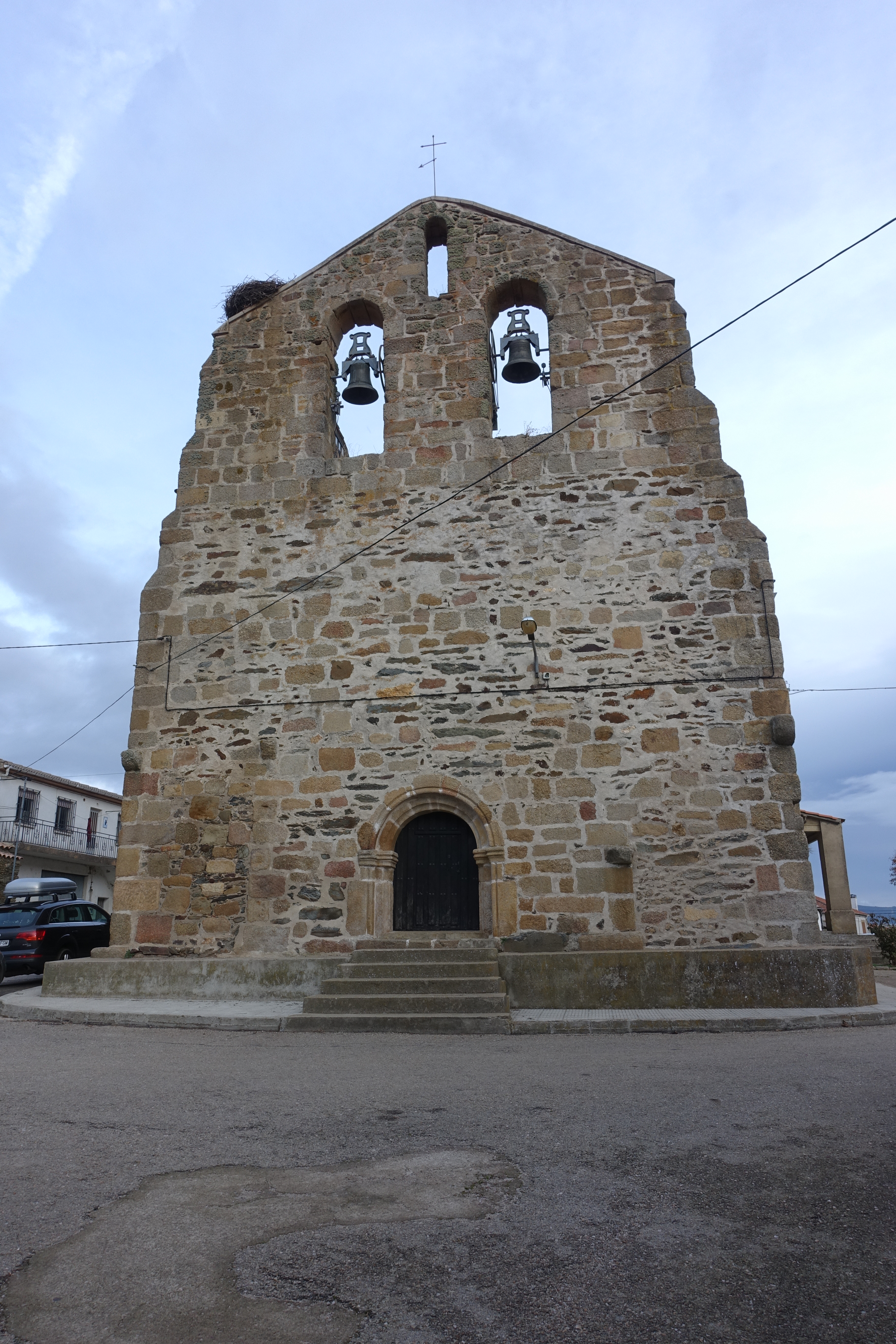 Iglesia de San Pedro Apóstol, El Sahugo (Salamanca, España).